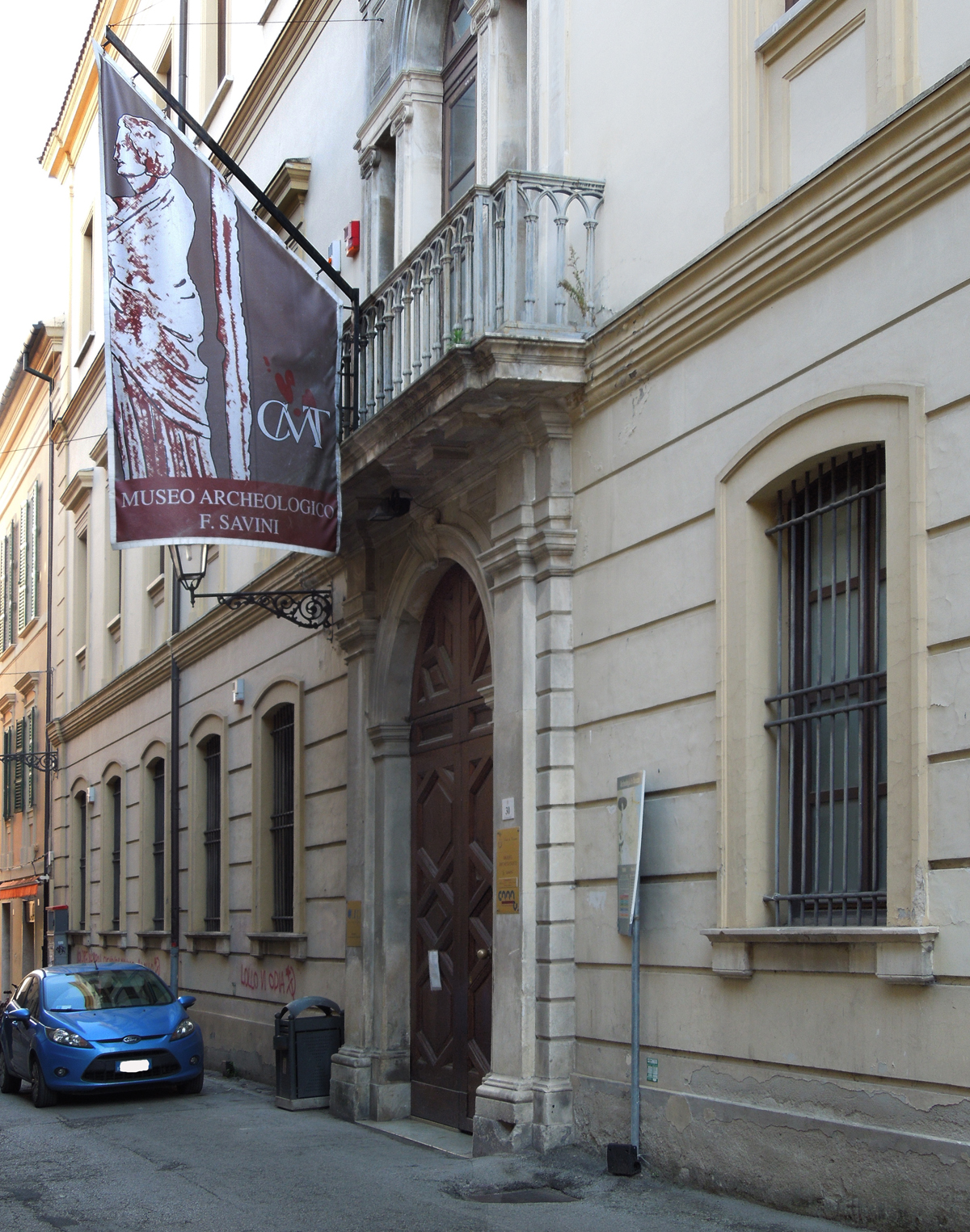 Ingresso del Museo archeologico Francesco Savini di Teramo in via Melchiorre Delfico, 30.